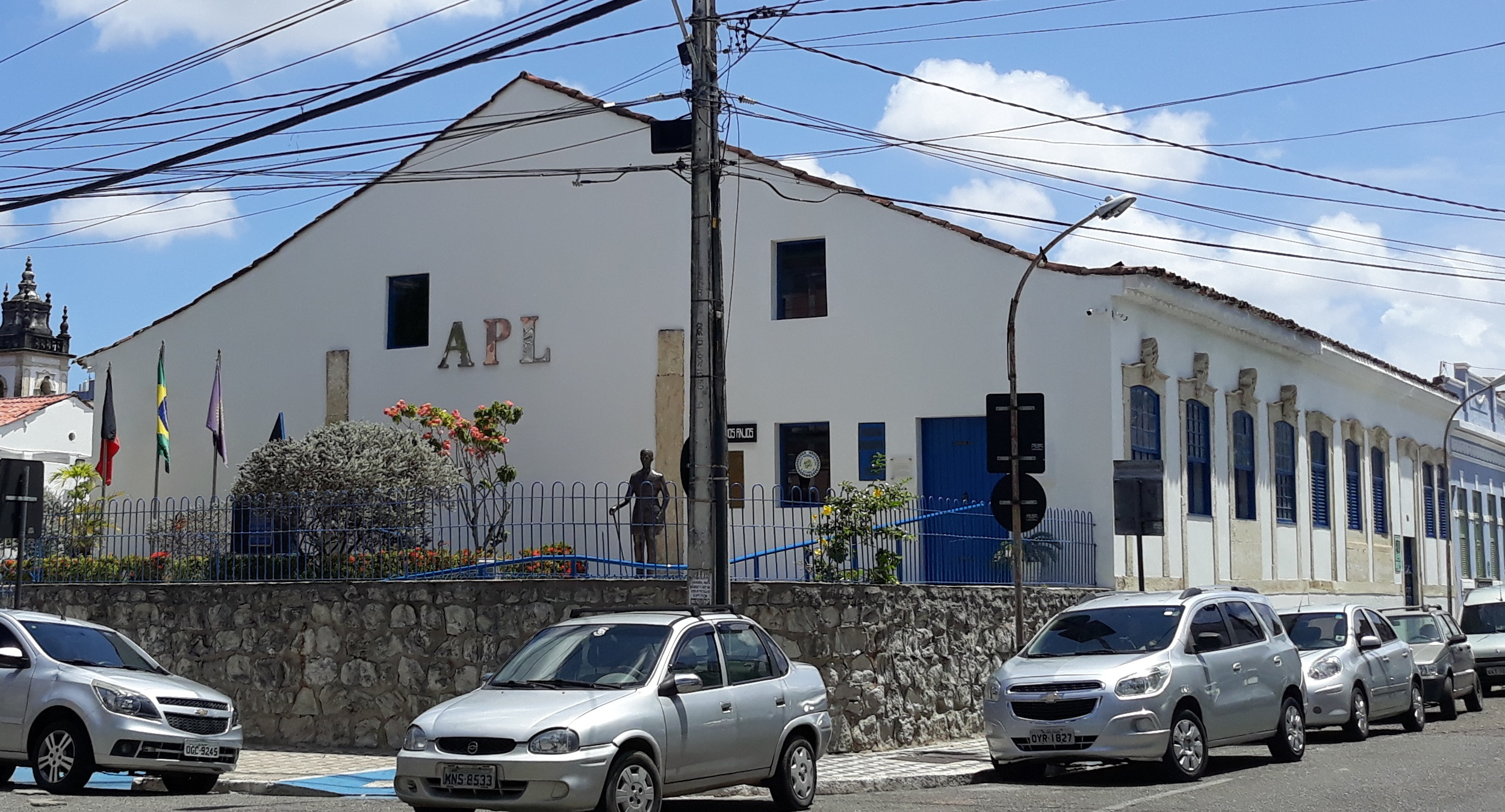 Academia Paraibana de Letras, antiga residência do poeta Augusto dos Anjos, no Centro Histórico de João Pessoa, Paraíba (Brasil)